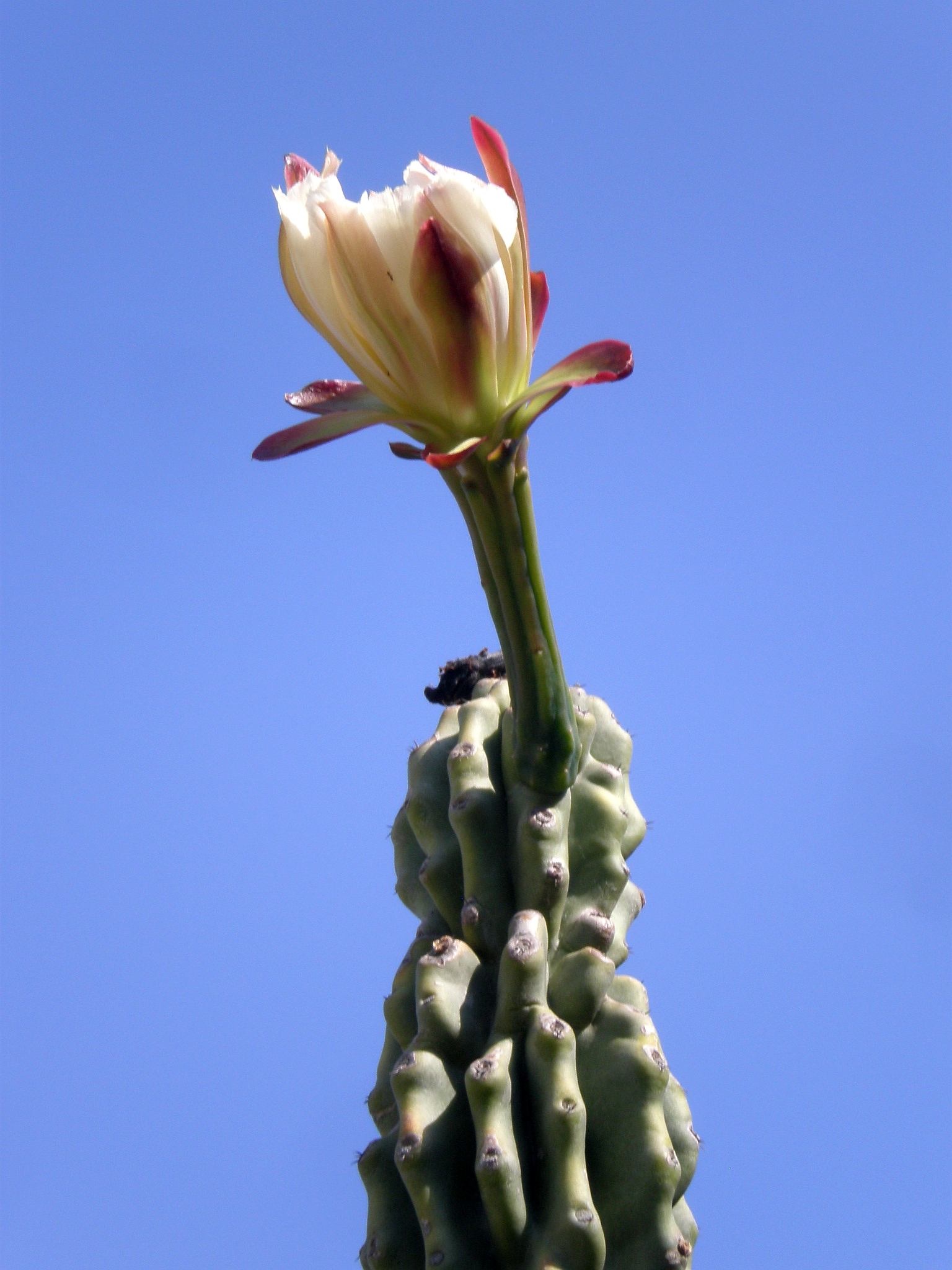 Jardín Botánico de Barcelona.